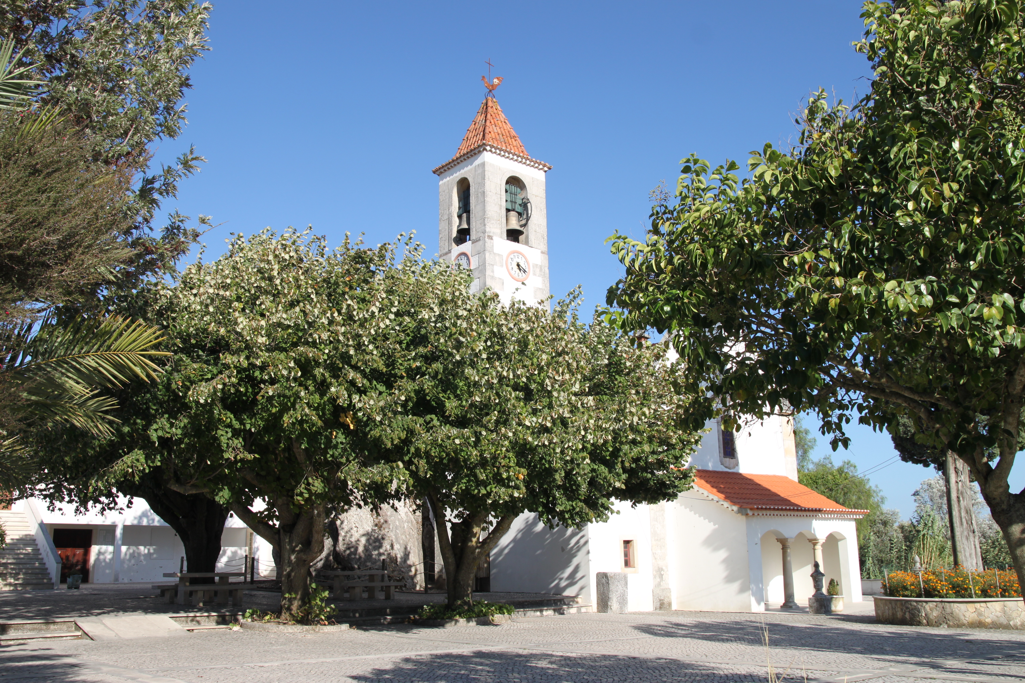 Igreja de Santa Maria Madalena ou Igreja Paroquial de Alcobertas, e megálito-capela adjacente This file was uploaded for Wiki Loves Monuments in Portugal with the unique identifier 72743.